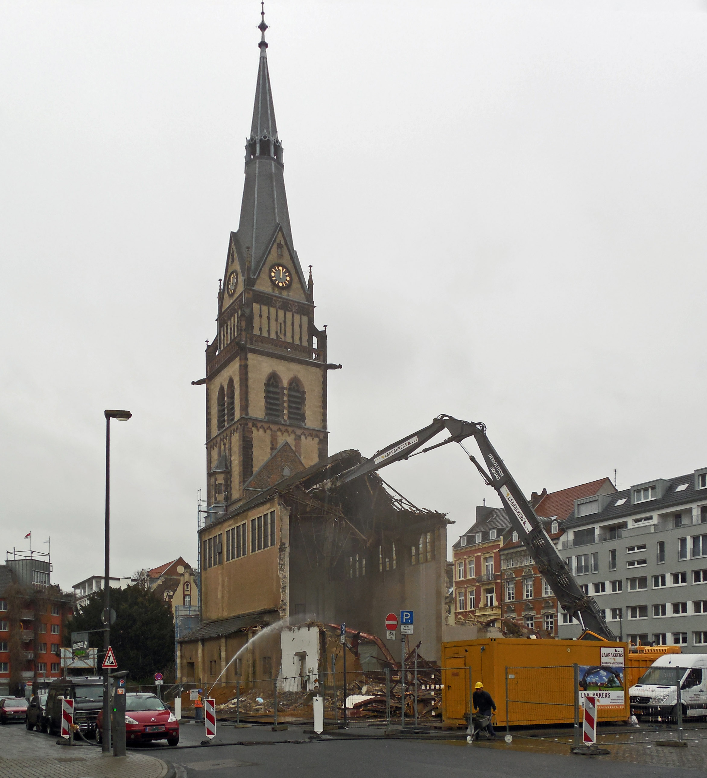 Christuskirche Köln Abriss des Kirchenschiffs 12. Februar 2014